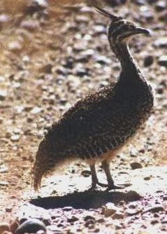 Eudromia elegans, Martineta, Copetona, foto -Habitat Patagonia, sur de Argentina